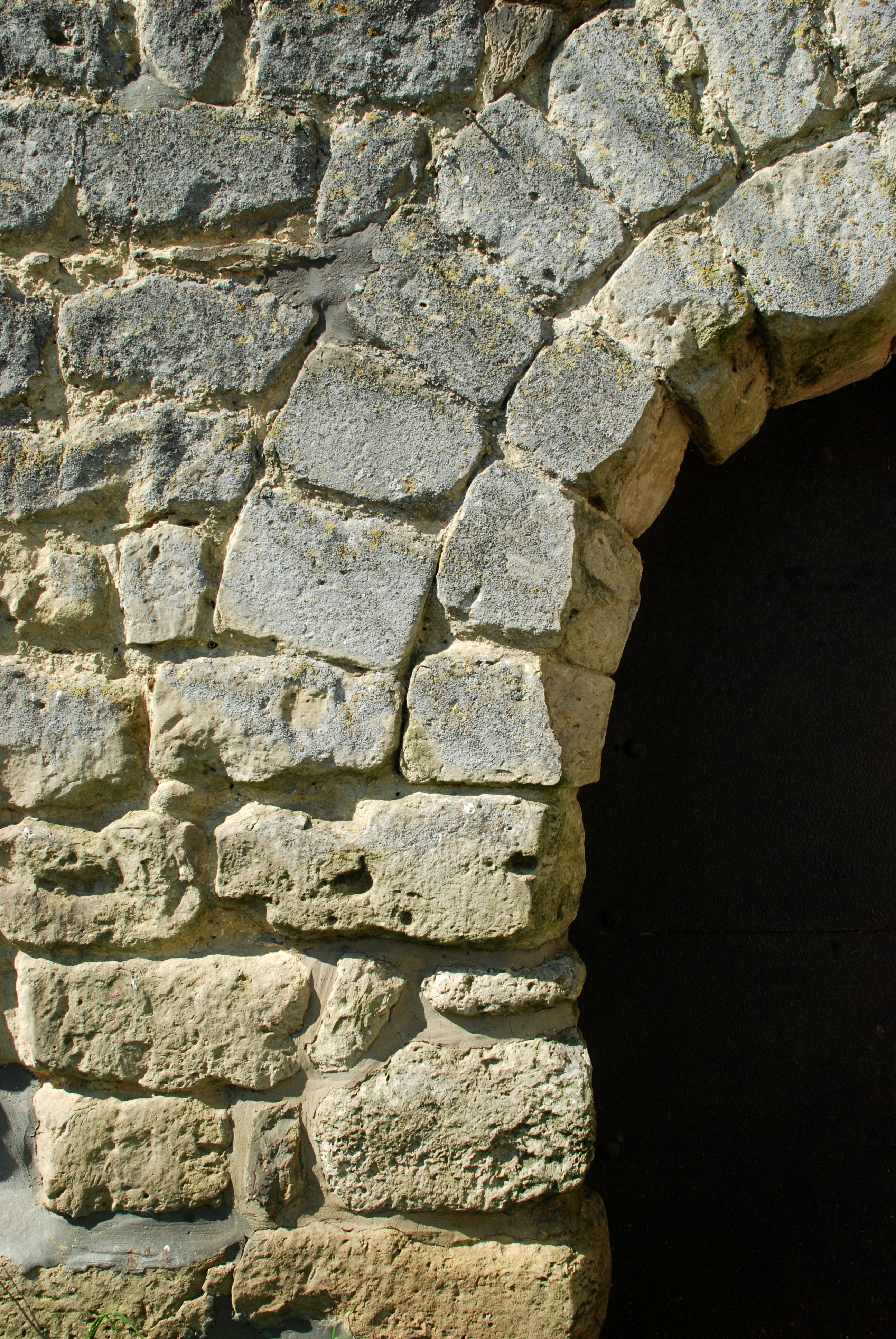 Belgique - Brabant wallon - Mont-Saint-Guibert - Corbais - Tour Griffon du Bois (donjon de Corbais, 13e siècle)